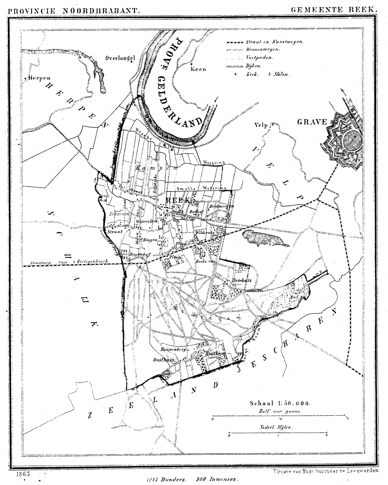 Nederland, Noord-Brabant, Gemeente Reek